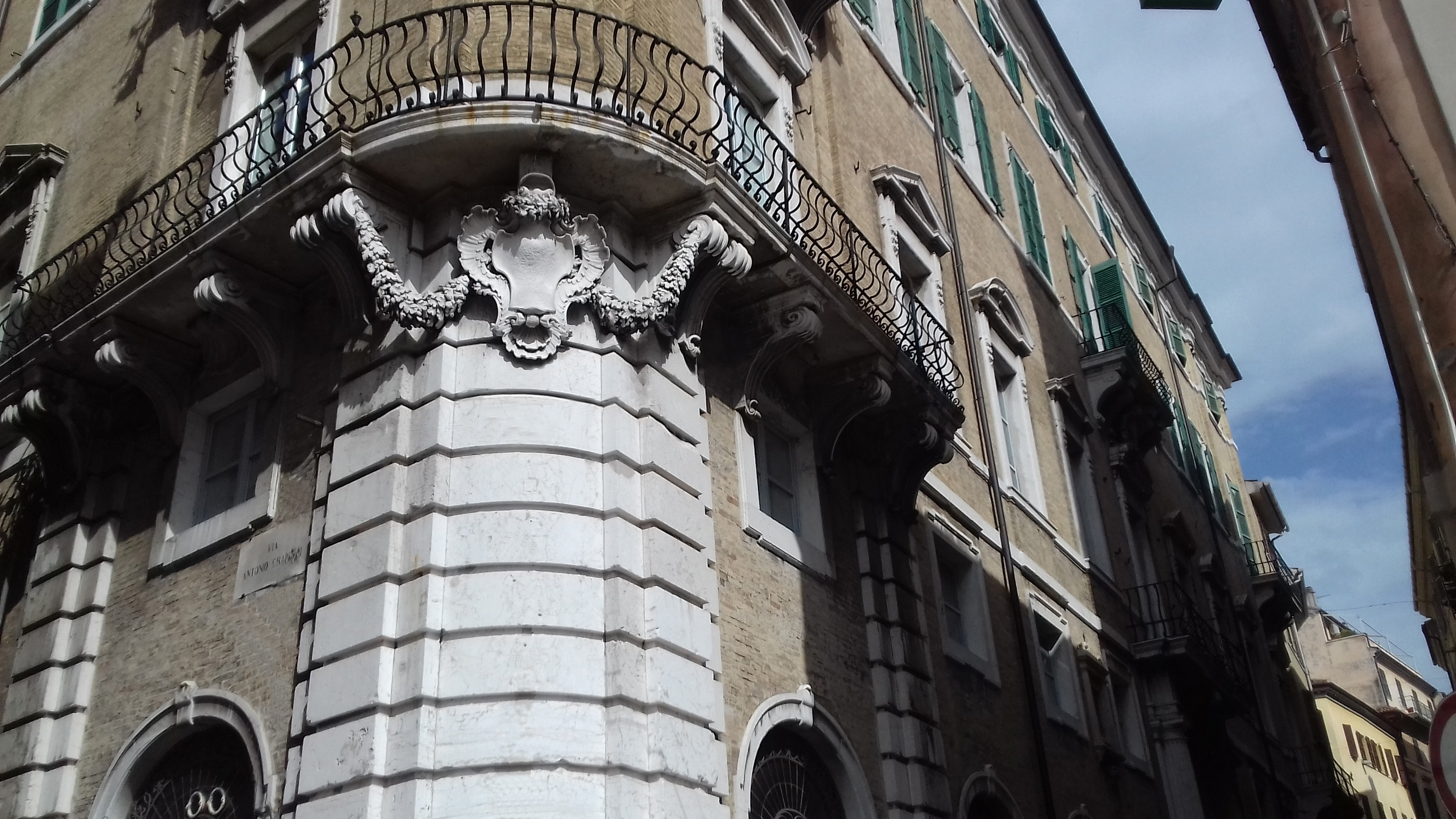 Sito in Corso Mazzini, 7. Opera di Vanvitelli, Marchionni e Ciaraffoni.